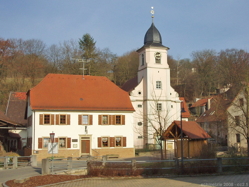 Kirche und hist. Gasthaus (Deinhard-Geburtshaus) in Bad Rappenau-Wollenberg